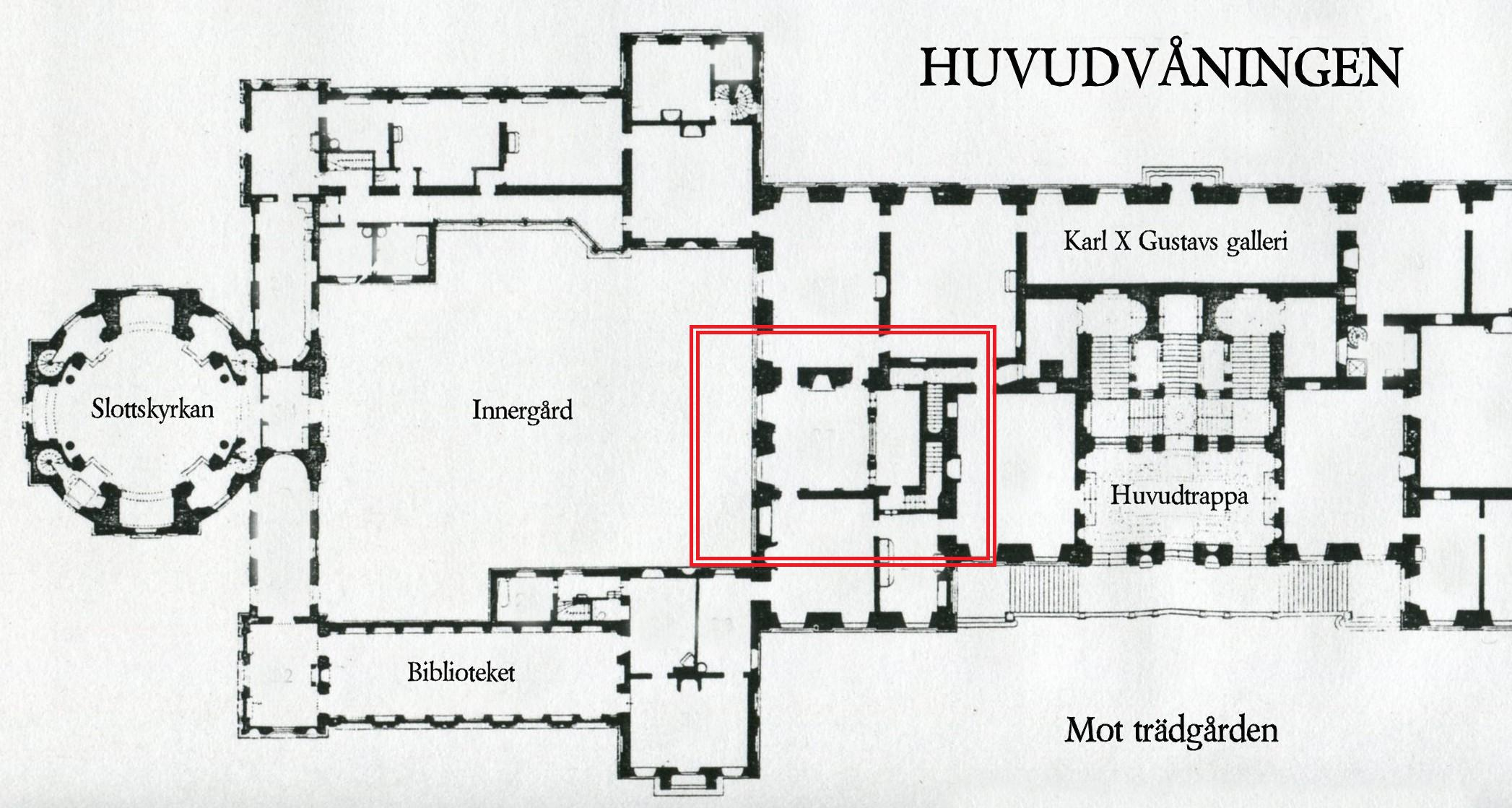 Drottningholms slott, planritning, huvudvåning, norra del, Hedvig Eleonoras paradsängkammare (inom röd ram)